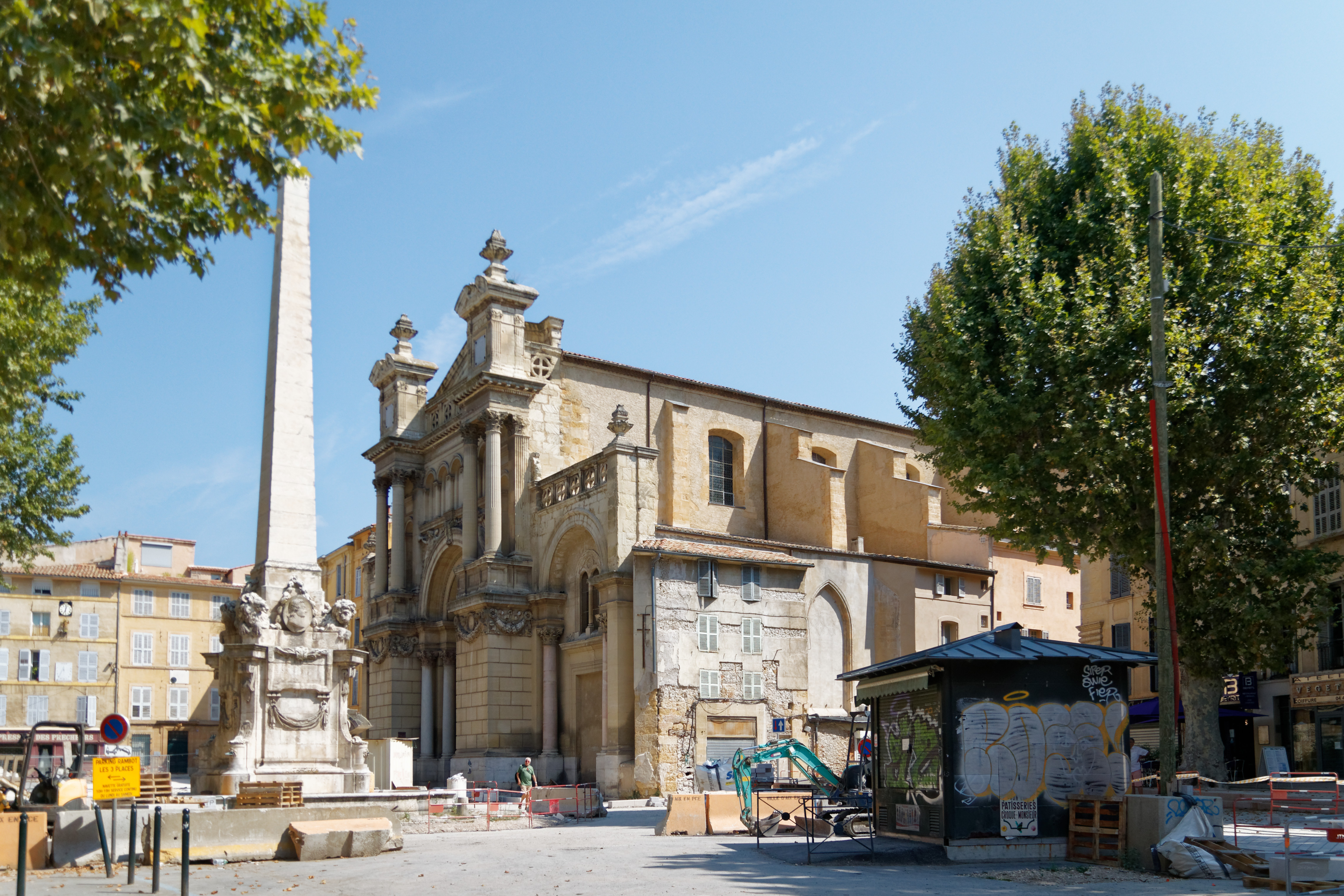 Kirche der heiligen Maria Magdalena (Église de la Madeleine) in Aix-en-Provence